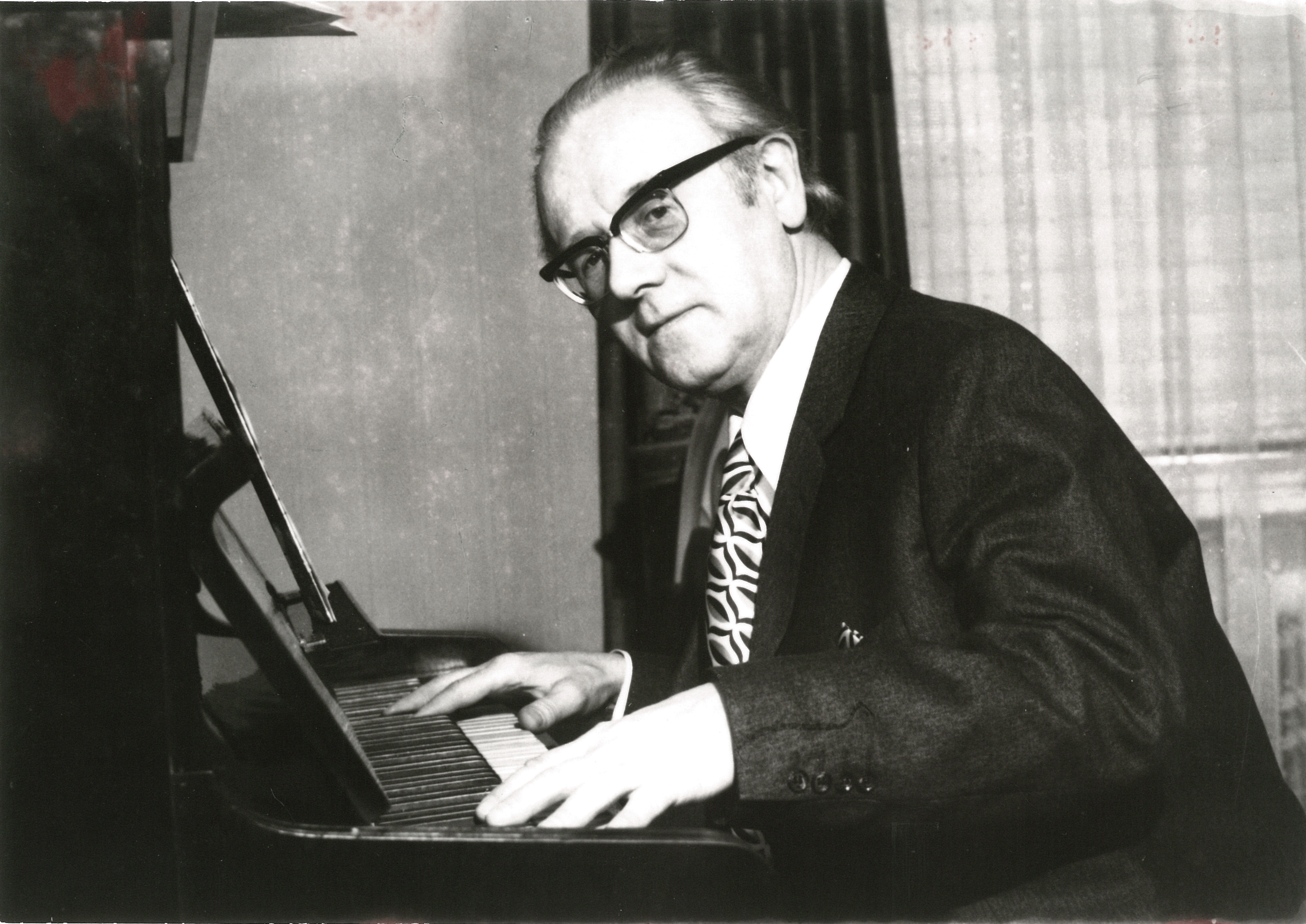 Selbstportrait von Leopold Paasch